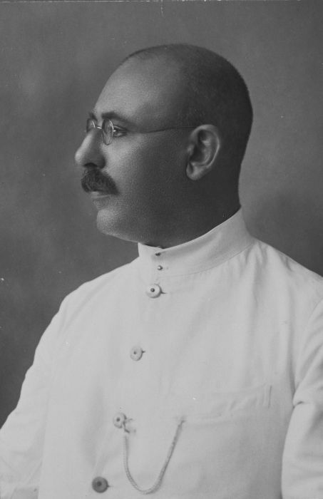 Foto. Portret van prof. Boonstra, Technische Hogeschool Bandung